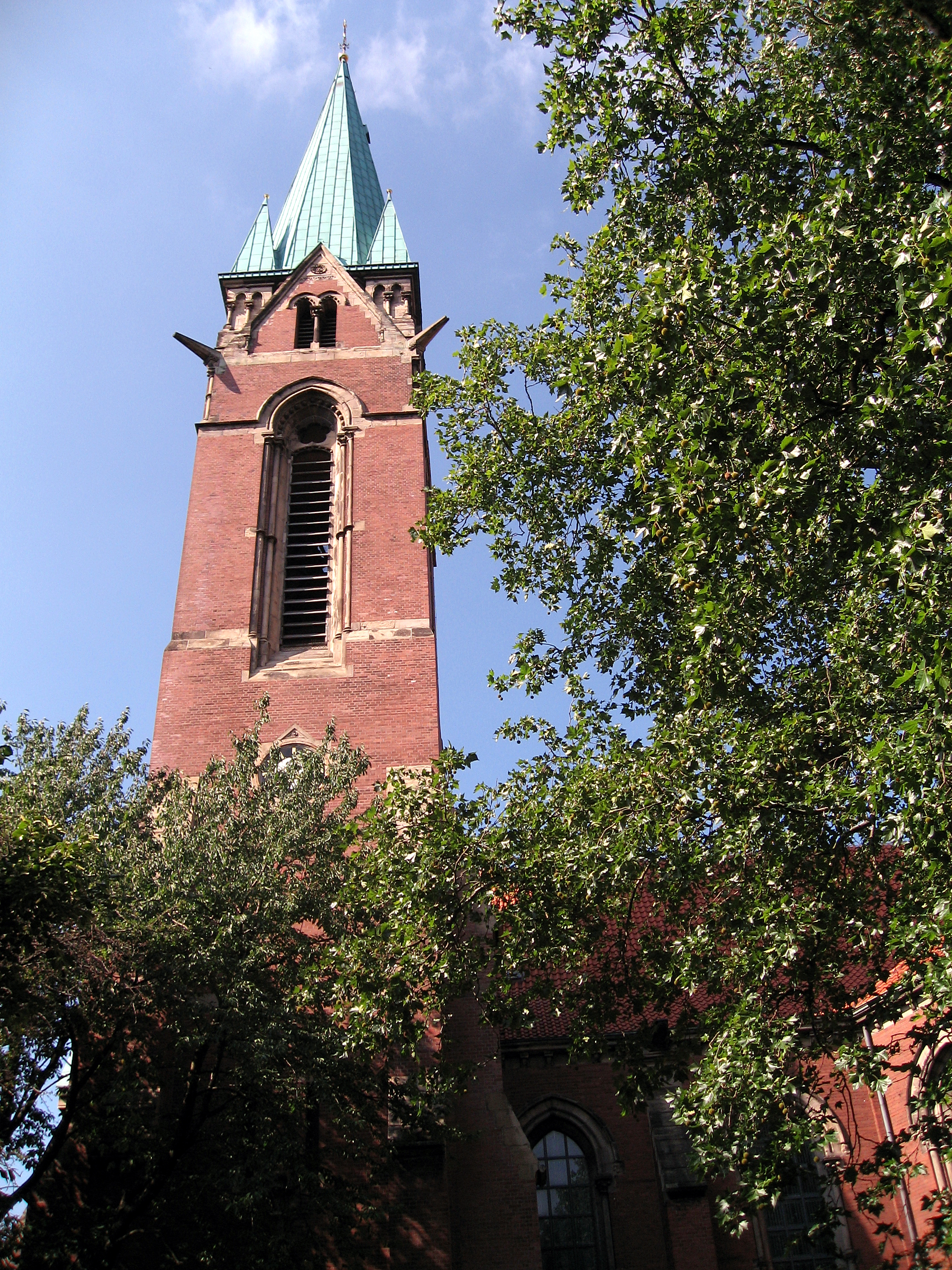 Dortmund, Nordstadt, Paulus-Kirche von der Kirchenstraße, Turm